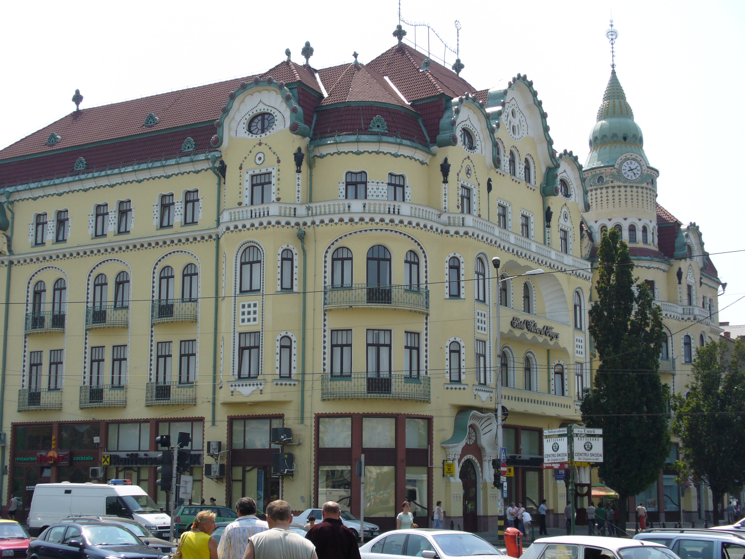 A nagyváradi Fekete Sas palota. 2006